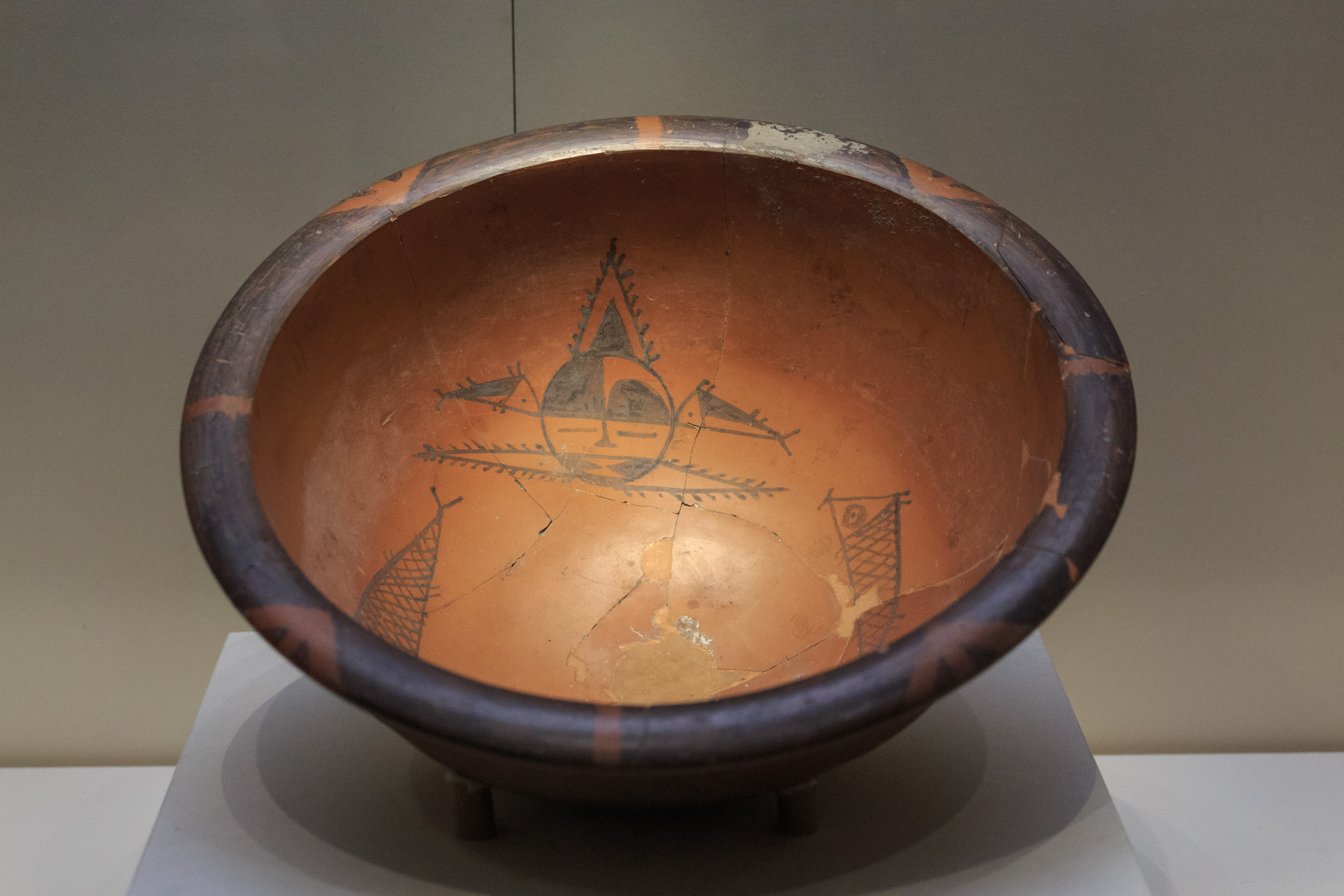 中国国家博物馆—— 人面鱼纹彩陶盆，仰韶文化，1955年陕西西安半坡出土